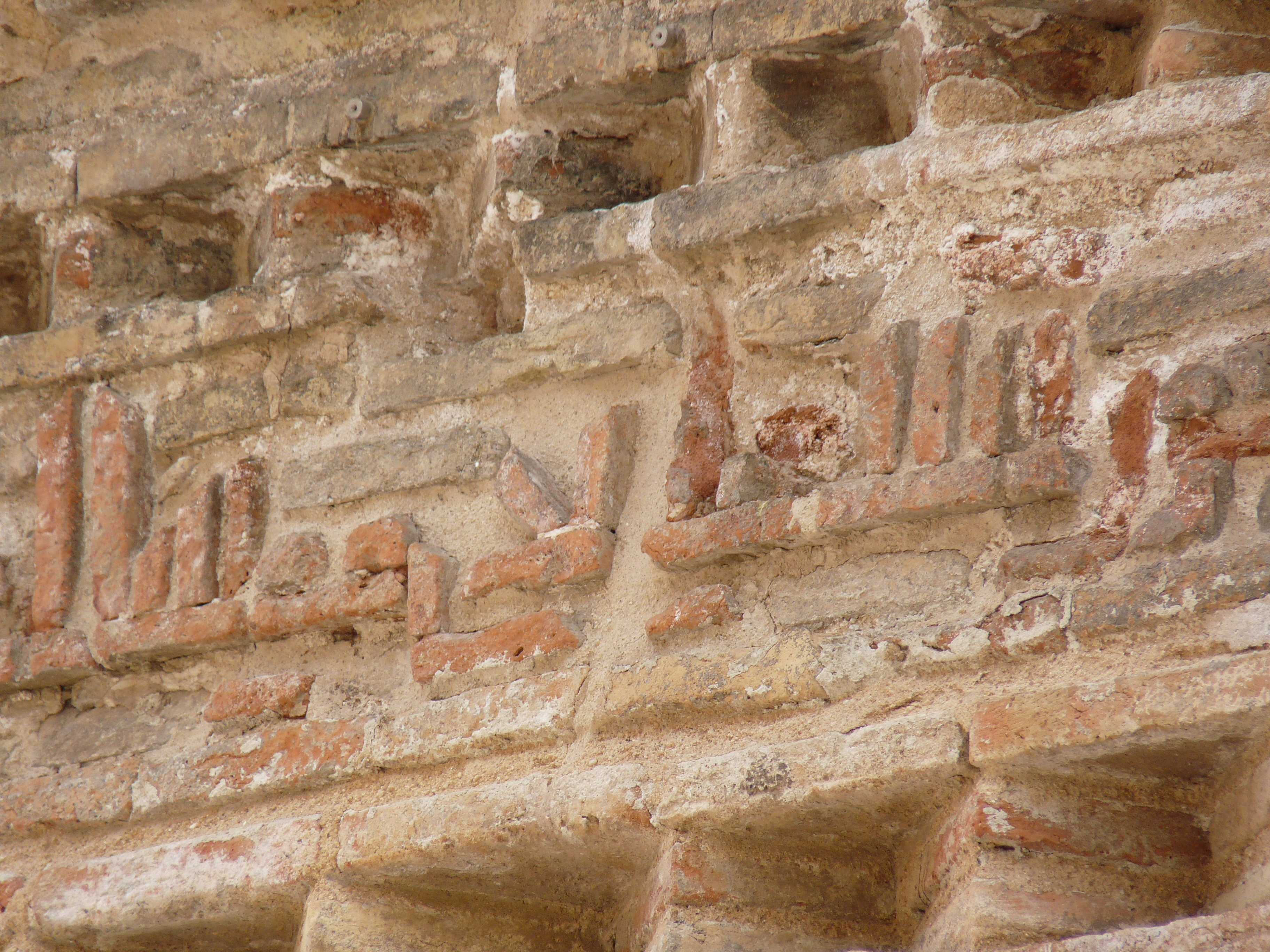 Toledo - Cristo de la Luz - Pies - Escritura árabe en ladrillo